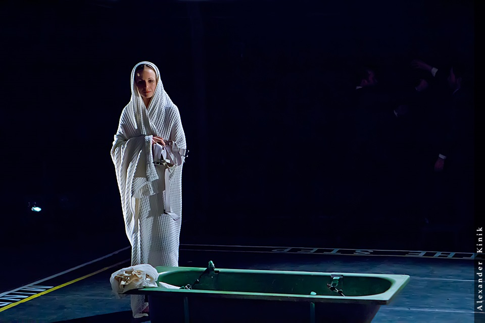 מיכל ויינברג במארי סטיוארט, בבימויו של עירא אבנרי, תיאטרון תמונע, 2012